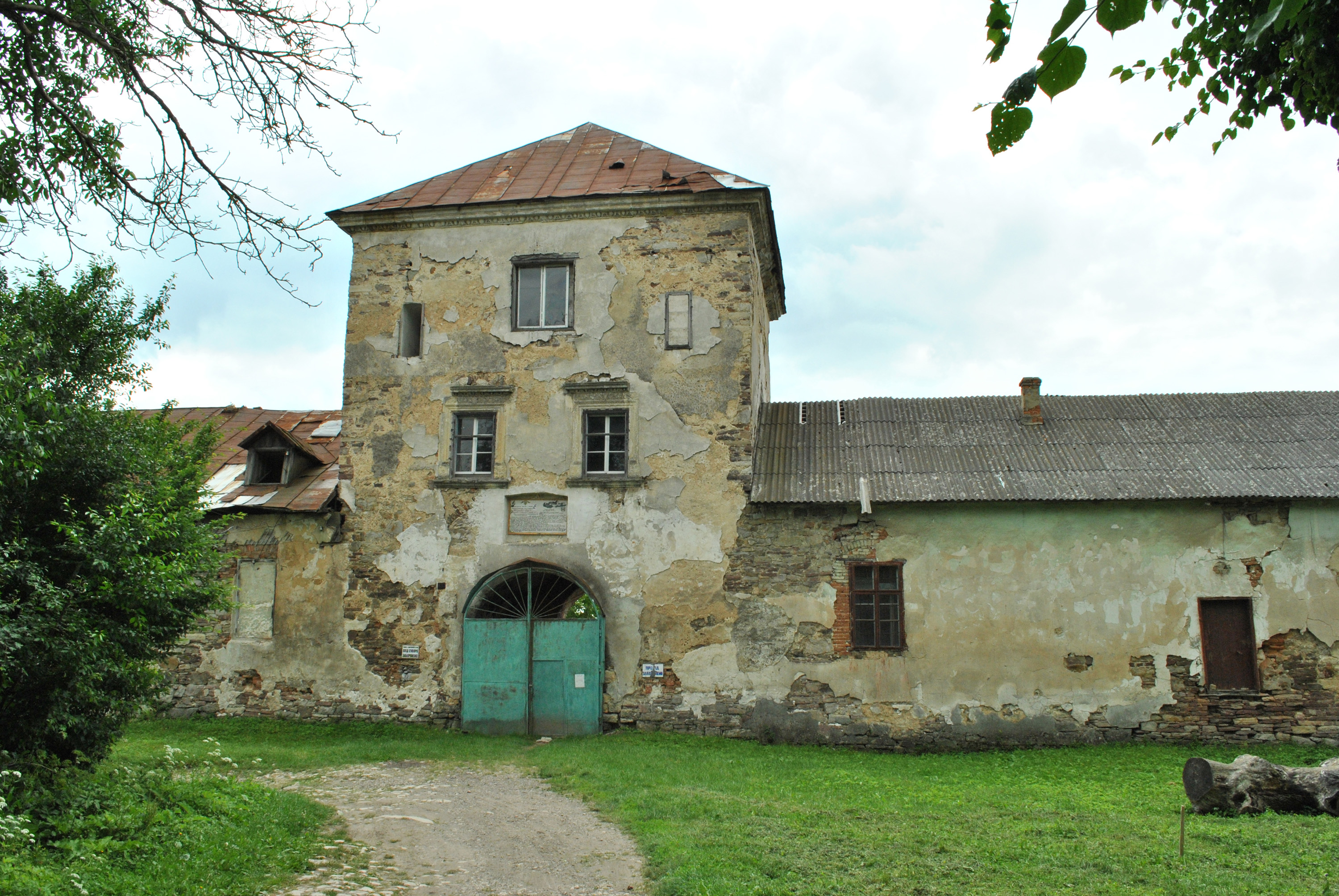 Замок (мур.), смт Золотий Потік Бучацького району Тернопільської області.